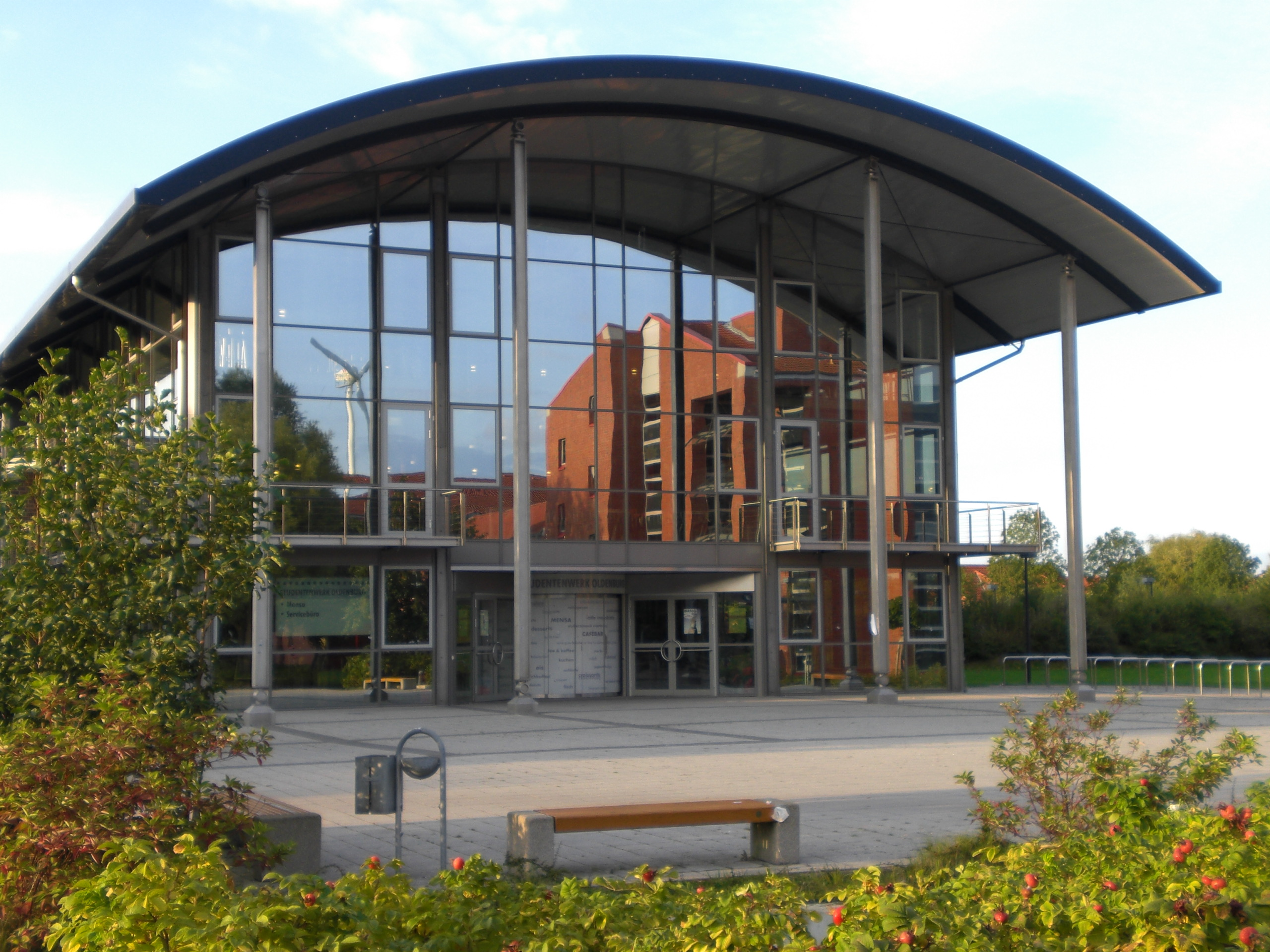 Mensagebäude des Oldenburger Studentenwerks der FH Emden/Leer am Standort Emden